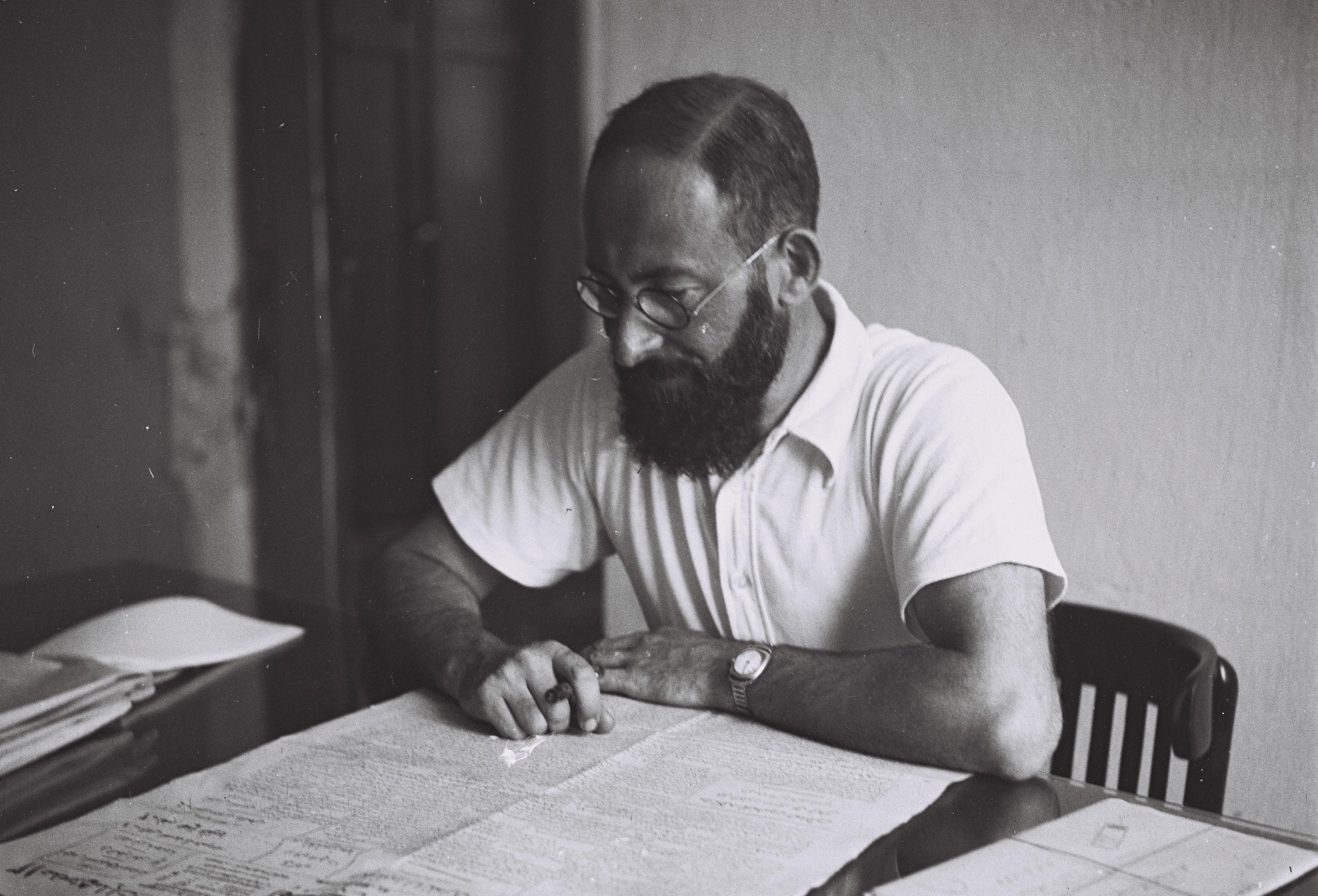 מיכאל אסף